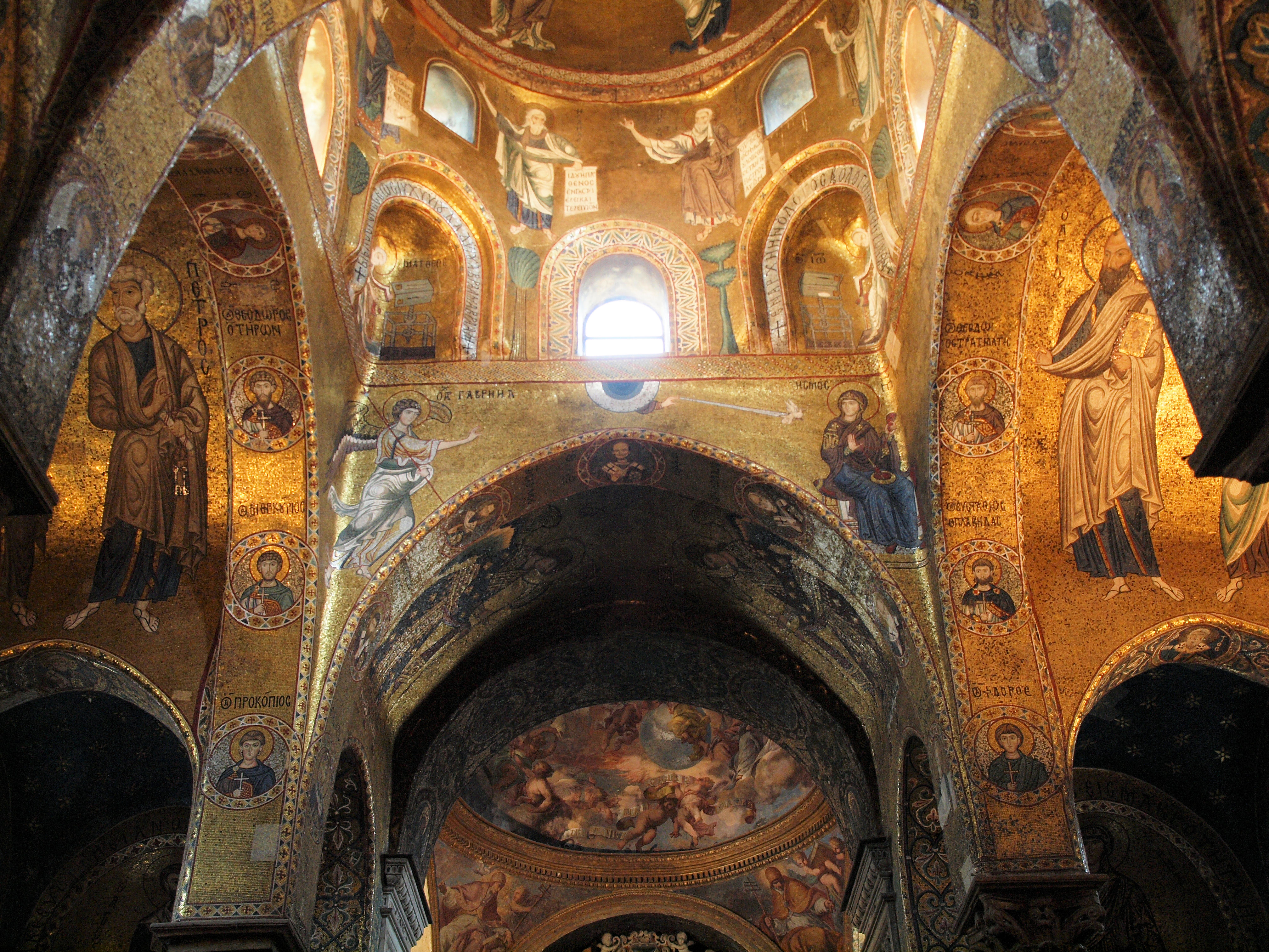 Innenaufnahme aus der Kirche Santa Maria dell'Ammiraglio in Palermo, auch genannt Martorana